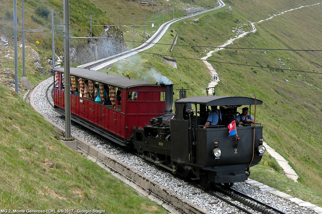 Locomotiva a vapore n. 2 (tipo H 2/3) della Ferrovia Monte Generoso al traino di un treno speciale.